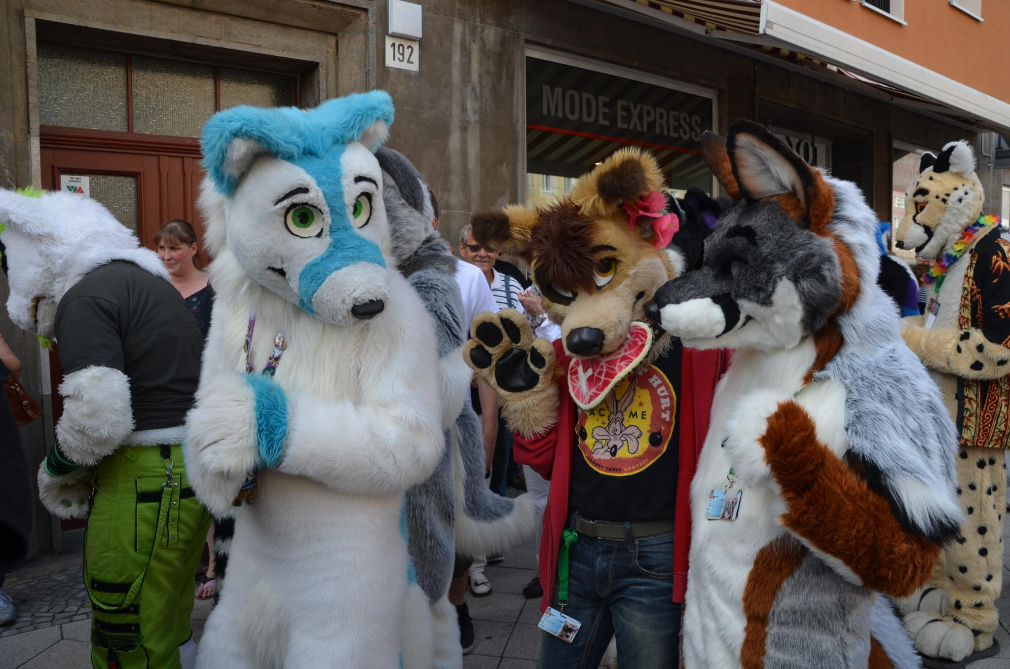 Furry Parade anläßlich der Eurofurence 19 in Magdeburg.